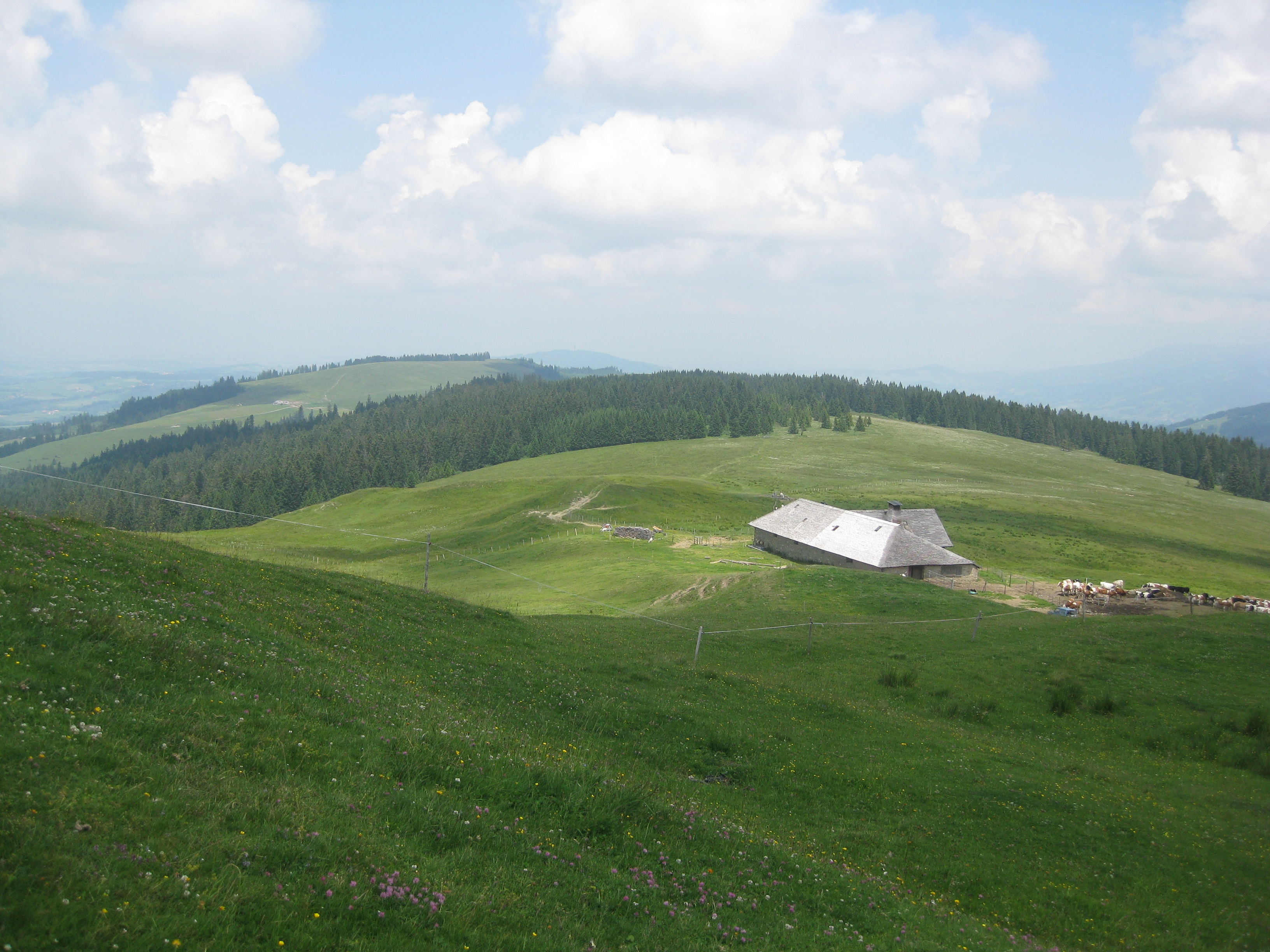 Vue depuis le sommet du Niremont, en direction du nord. Canton de Fribourg, en Suisse.